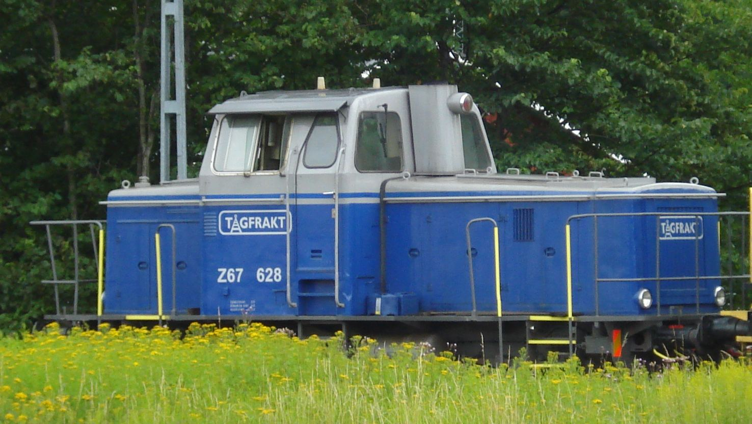 Tågfrakts Z67 628 i Motala